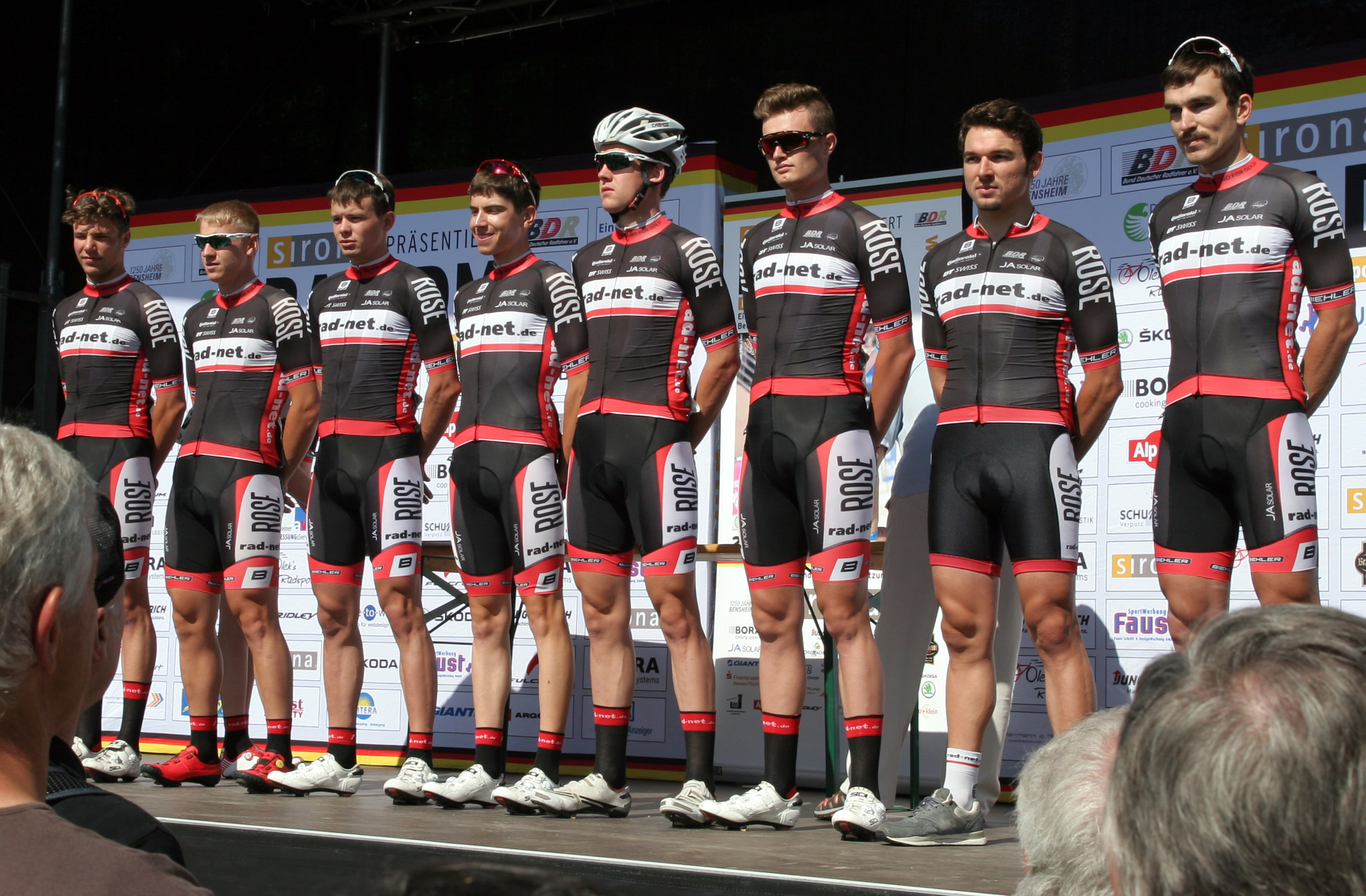 rad-net Rose Team bei der Vorstellung vor dem Rennen. Foto von den Deutschen Meisterschaften im Straßenrennen der Männer (Elite) am 28. Juni 2015 in Bensheim (Hessen)